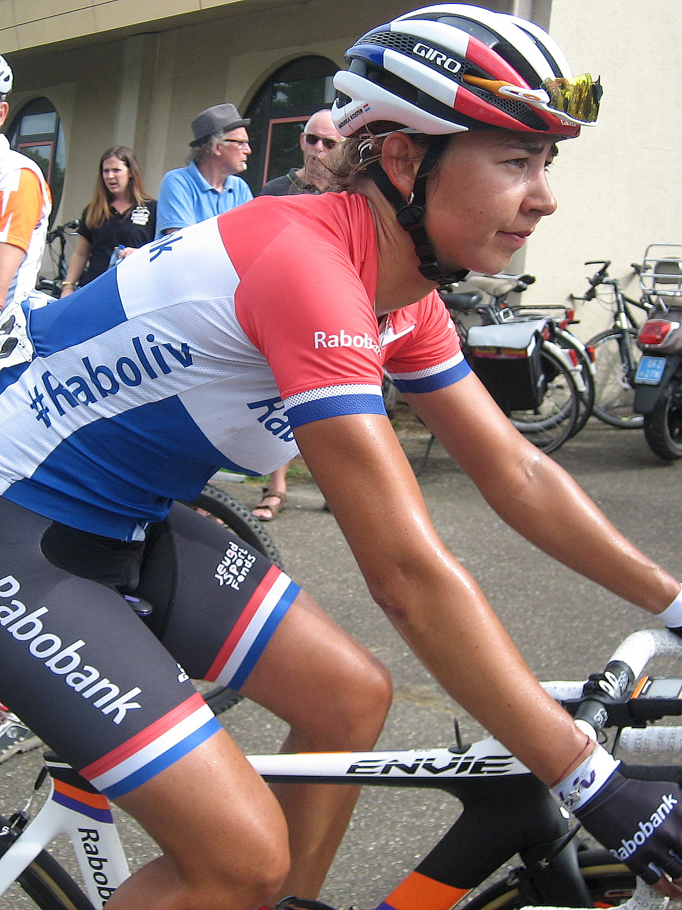 Anouska Koster (Rabo-Liv) na finish 3e etappe Holland Ladies Tour 2016